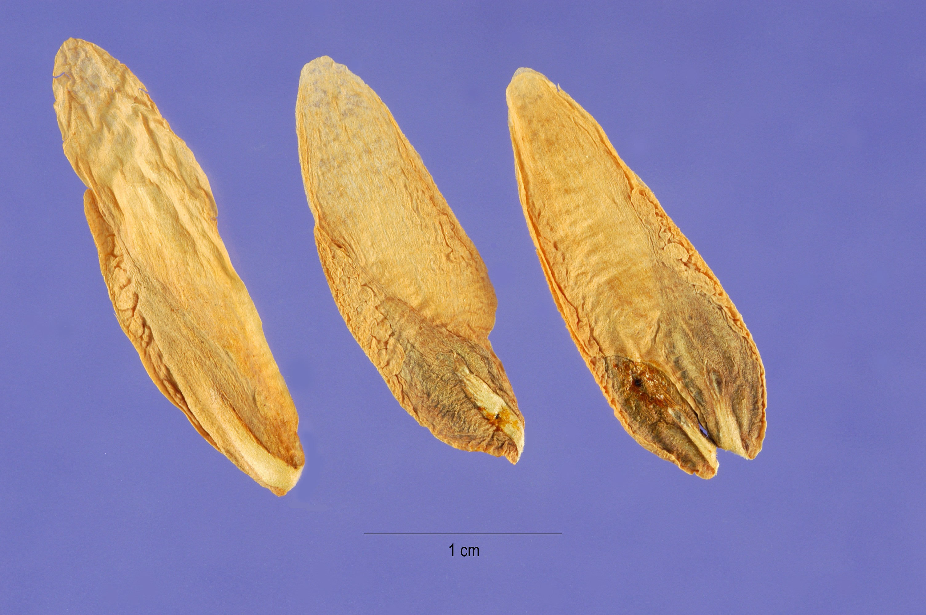 Calocedrus decurrens (Torr.) Florin. Incense Cedar